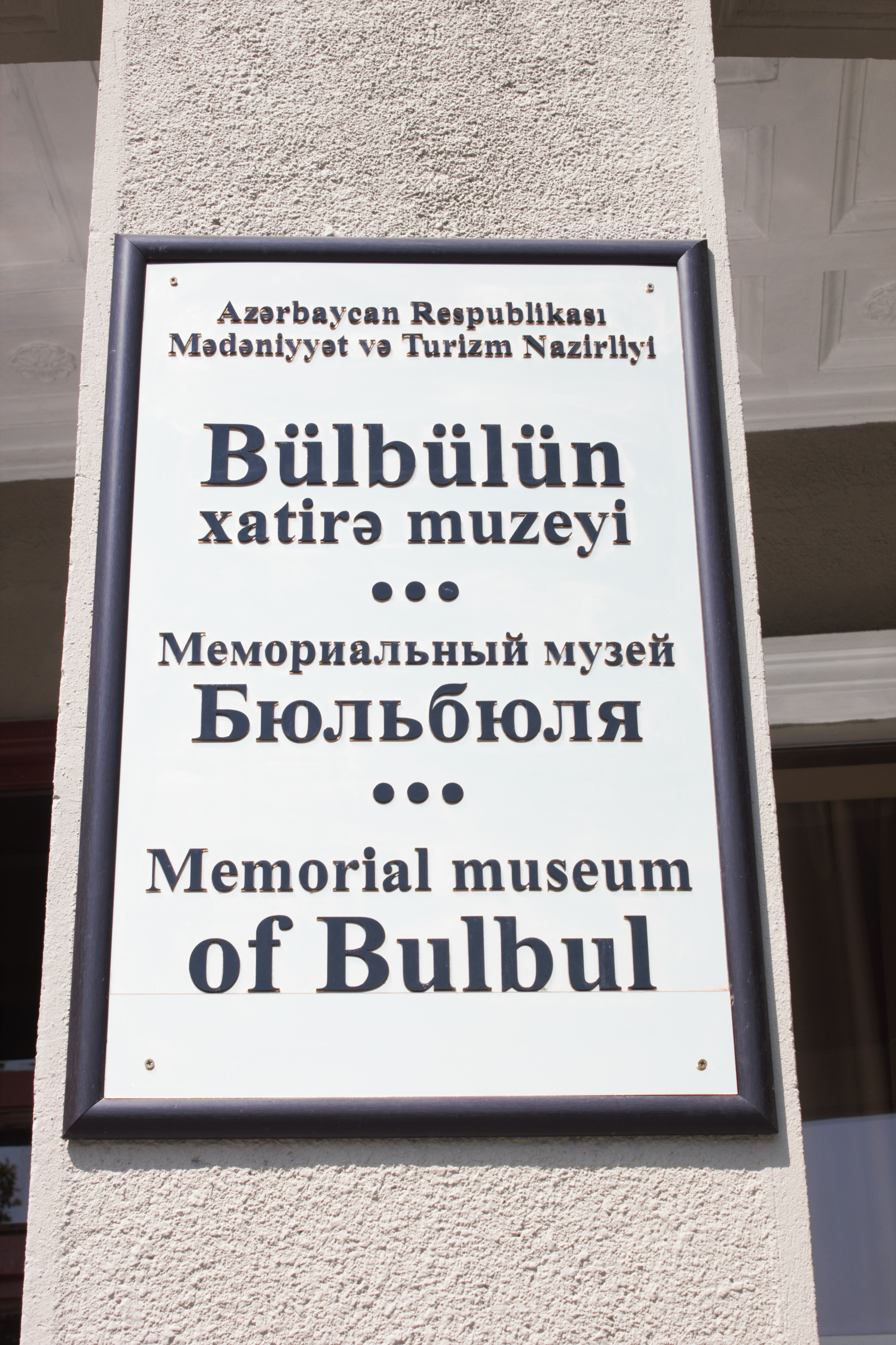 Табличка дома-музея азербайджанского оперного певца Бюльбюля (Муртуза Мешади Рза оглы Мамедов)